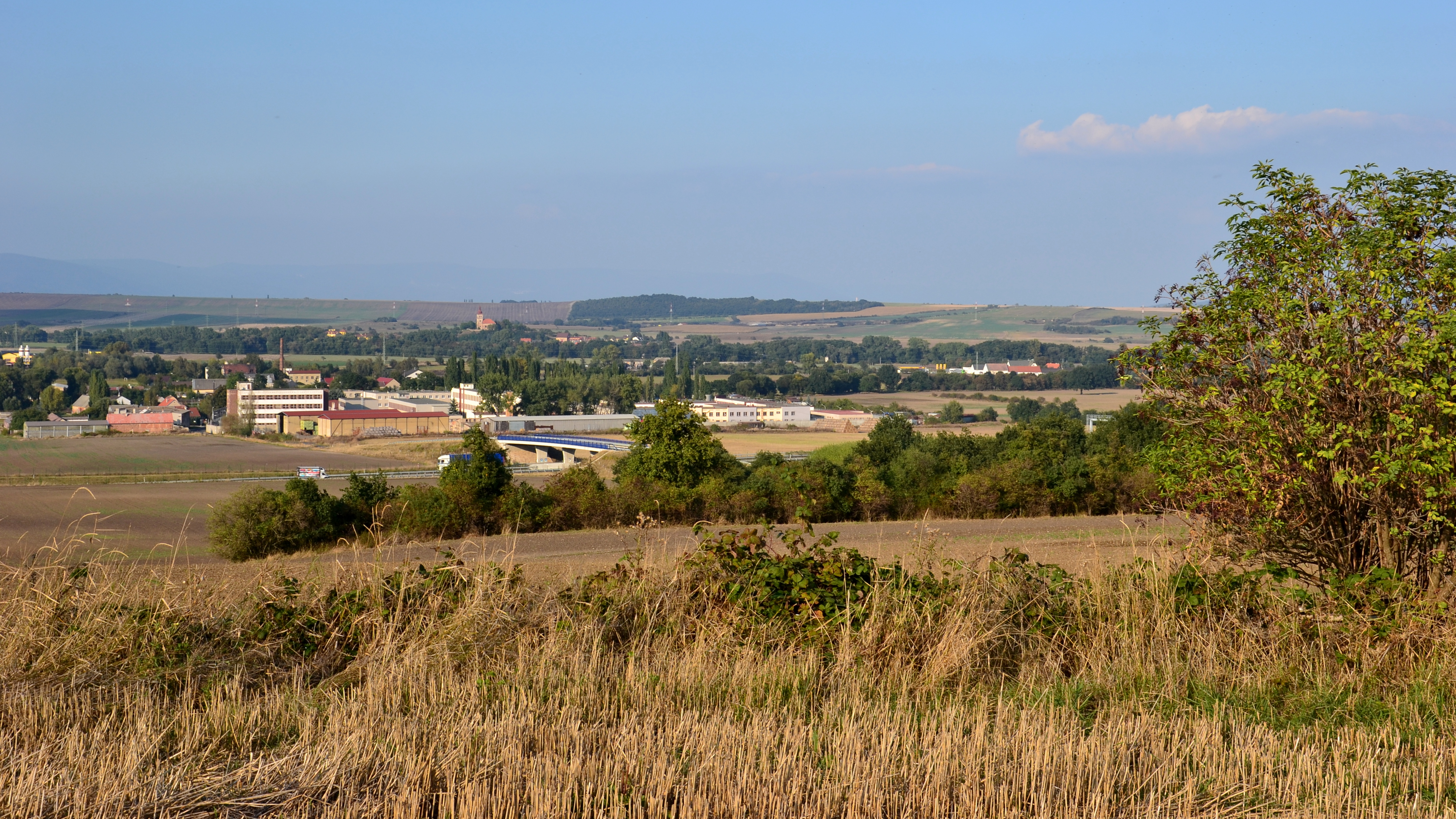 Všehrdy z jihozápadu